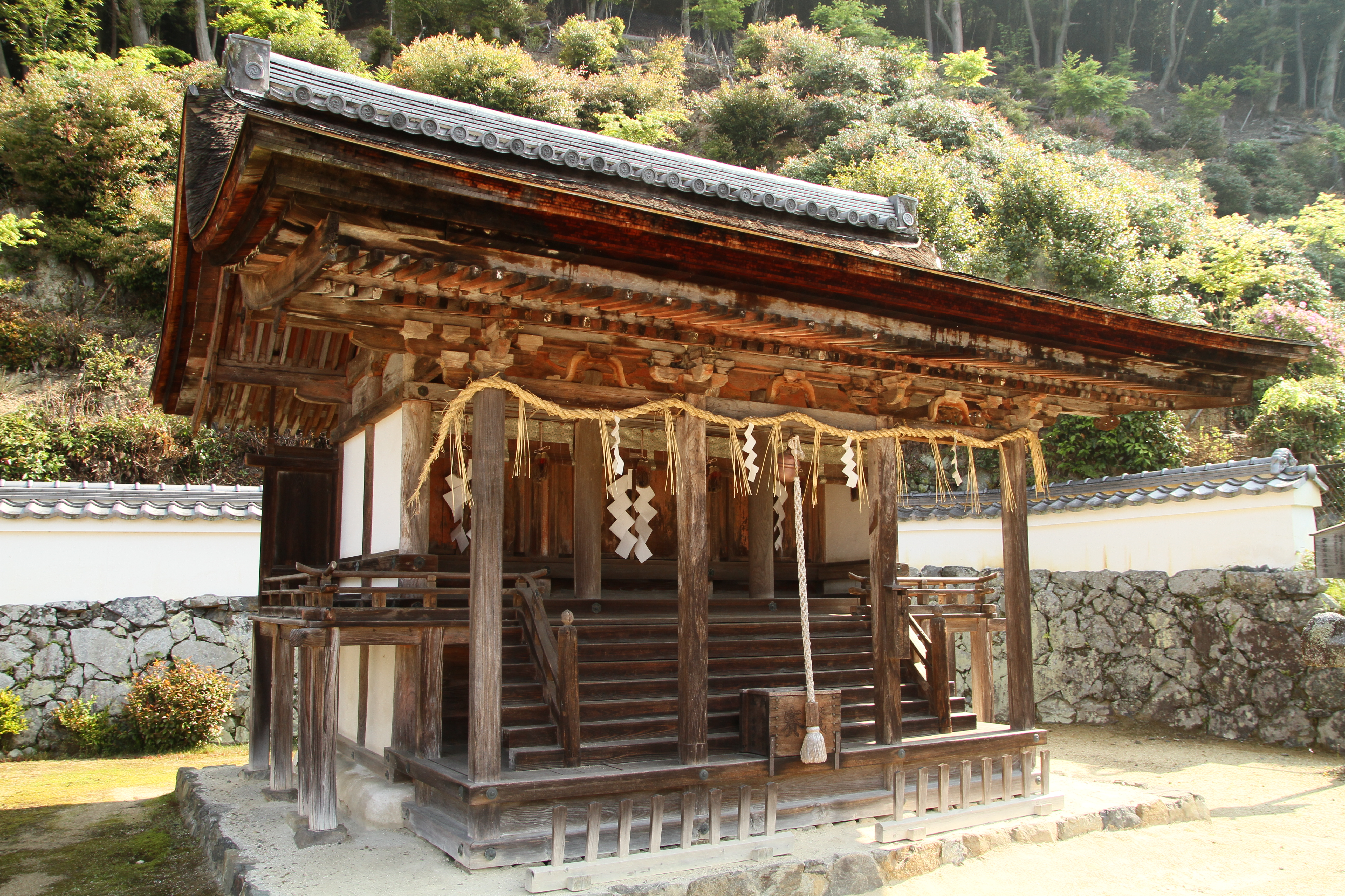 三室戸寺にある十八神社